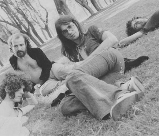 Pescado Rabioso circa 1973.